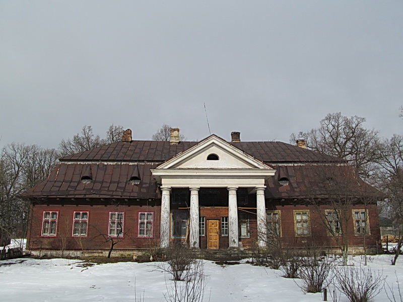 Заполле. Сядзіба Плятэраў. This is a photo of Belarusian heritage monument. Reference number: 112Г000562 ( WLM)